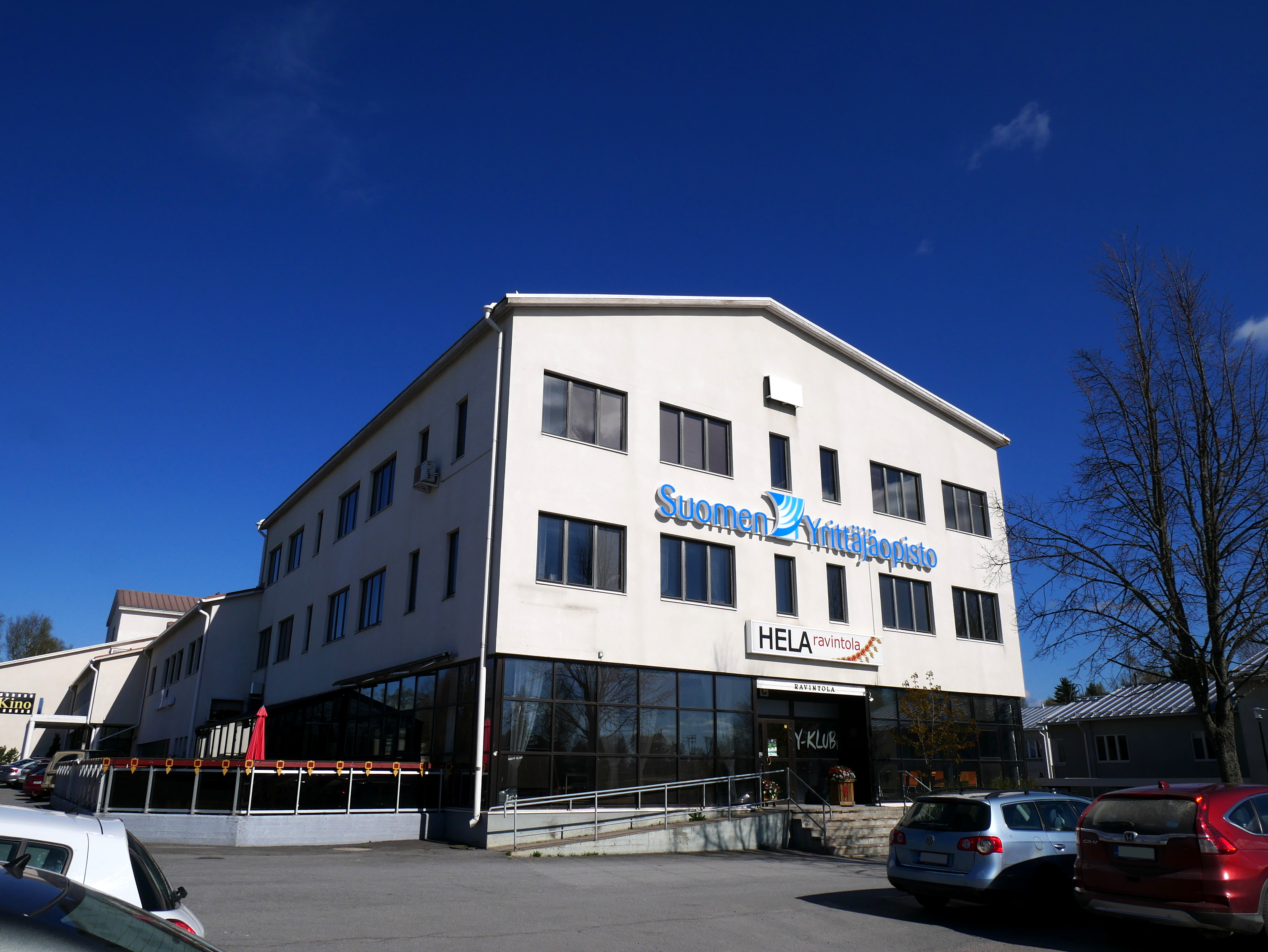 Suomen Yrittäjäopisto ja Hela-Ravintola Kauhavalla.